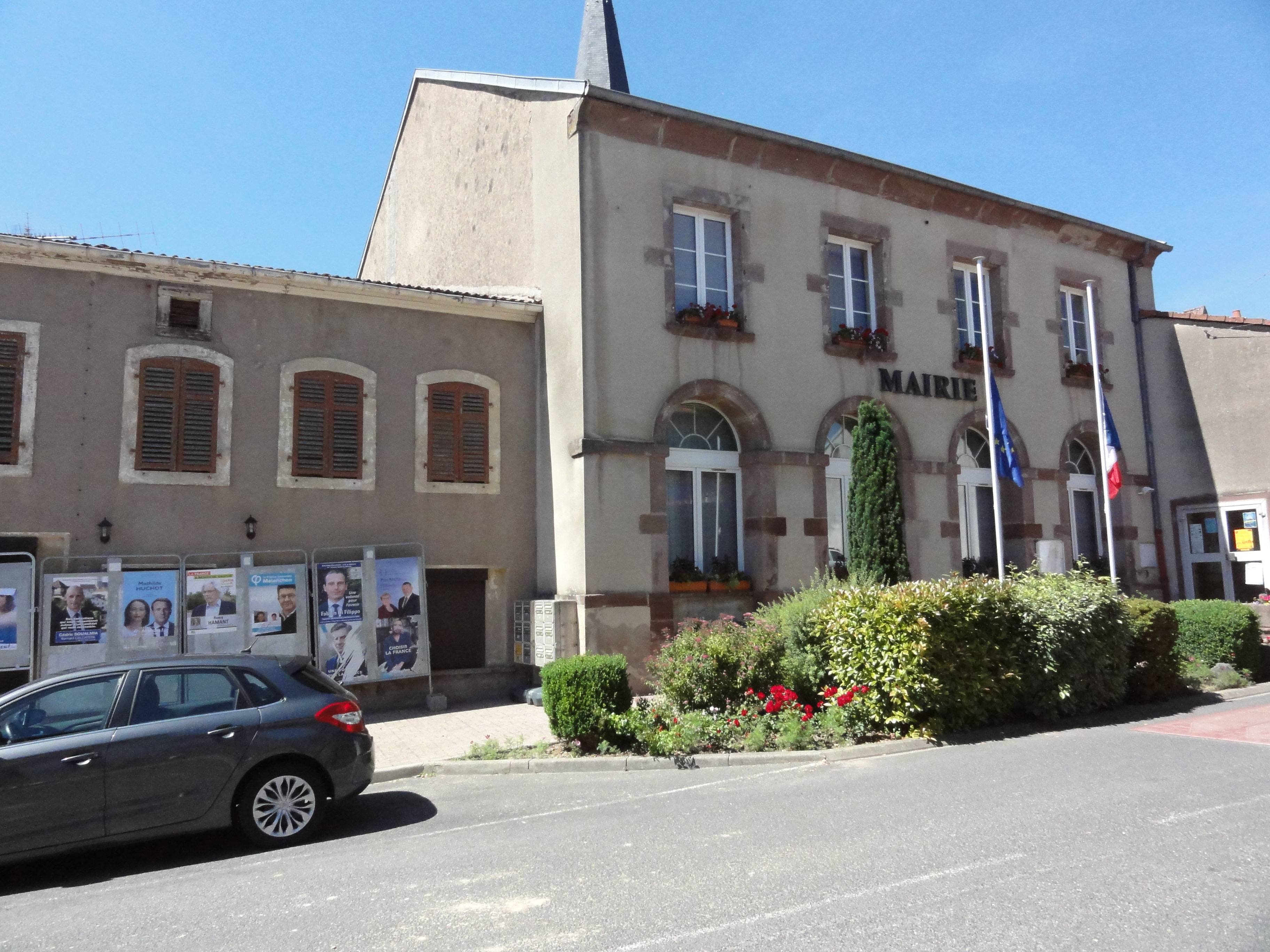 Vergaville (Moselle) mairie